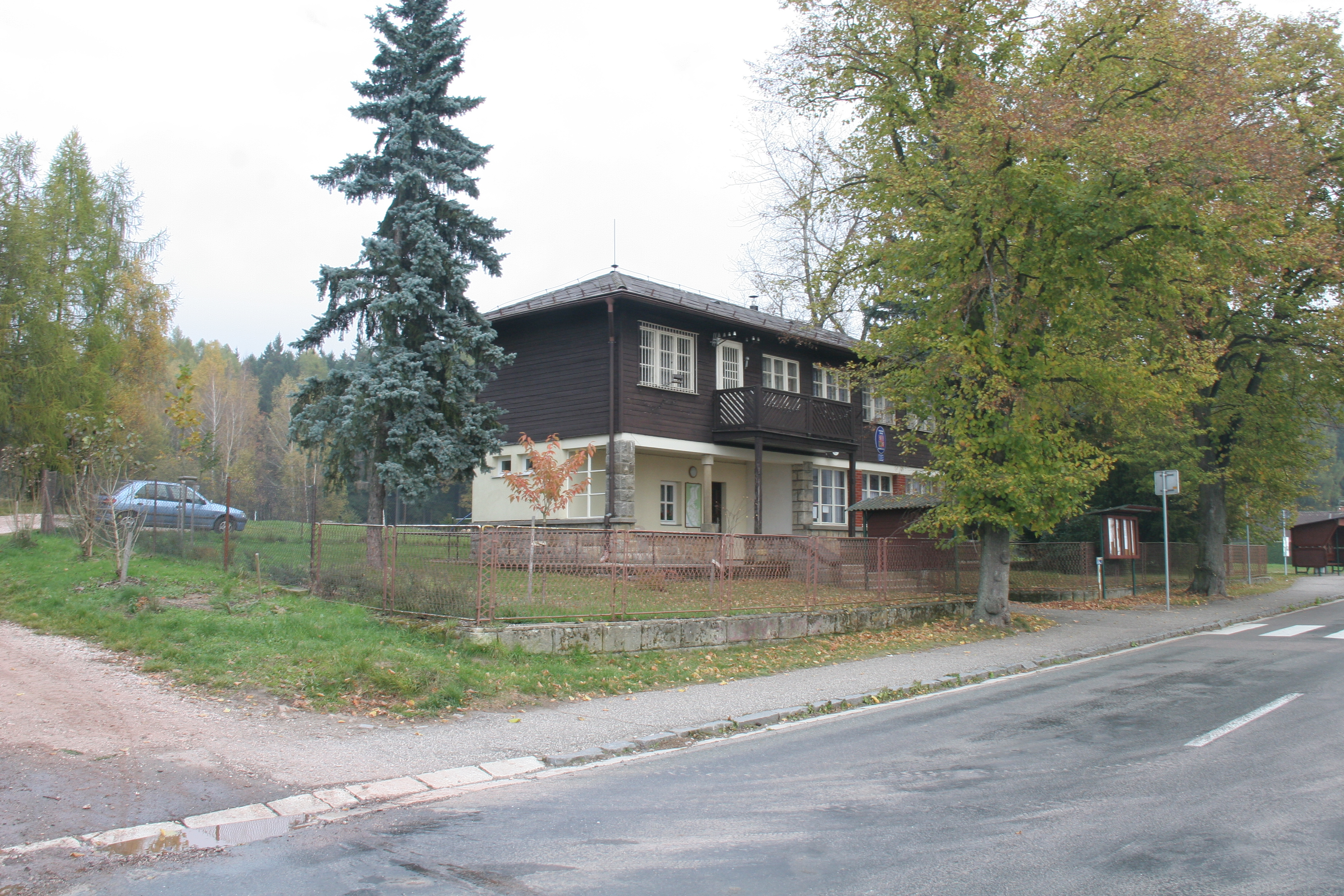 Nemojov obecní úřad